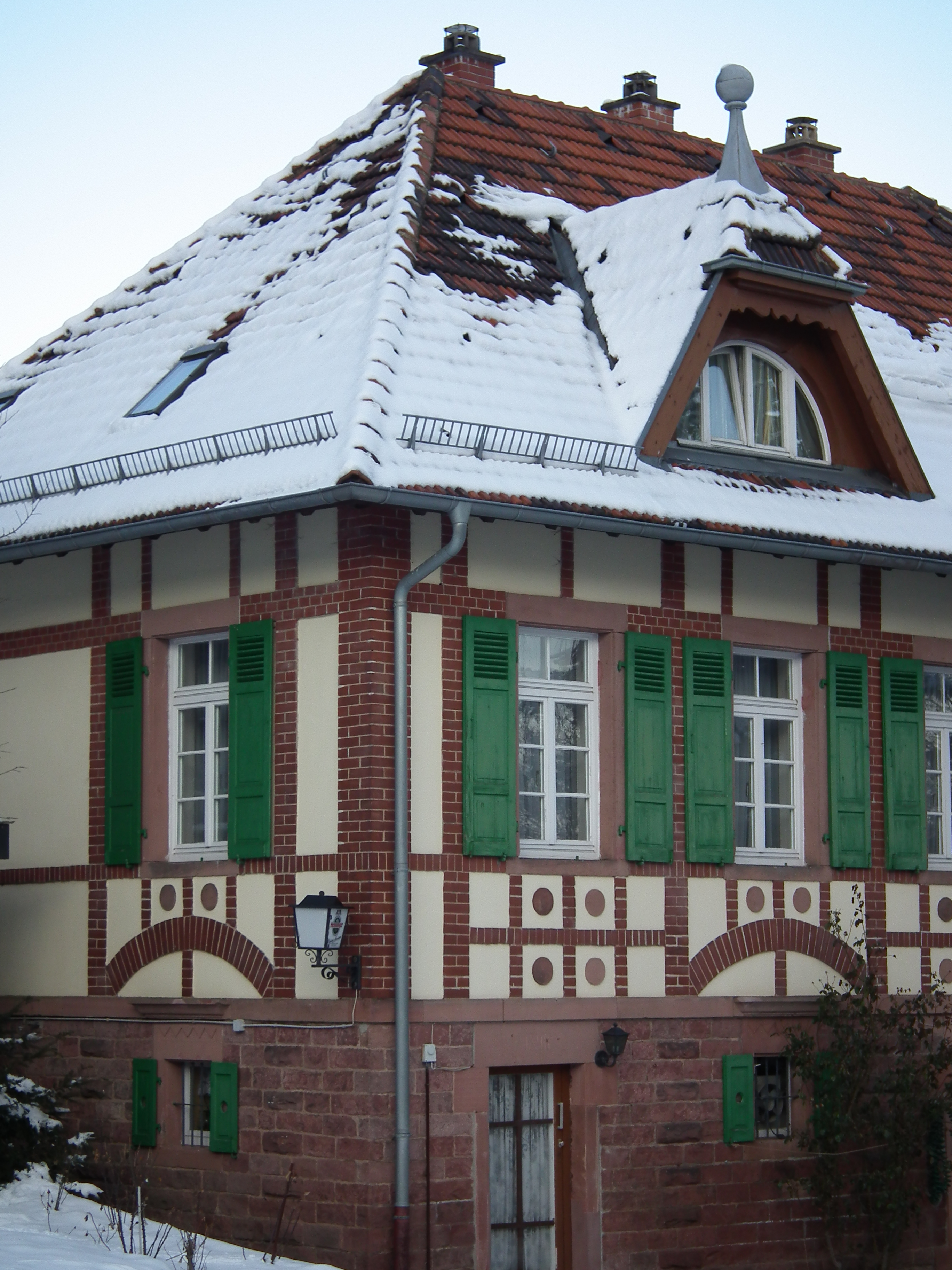 Wohnhaus mit grünen Fensterläden auf dem Heidelberger Kohlhof (Baden-Württemberg, Deutschland)